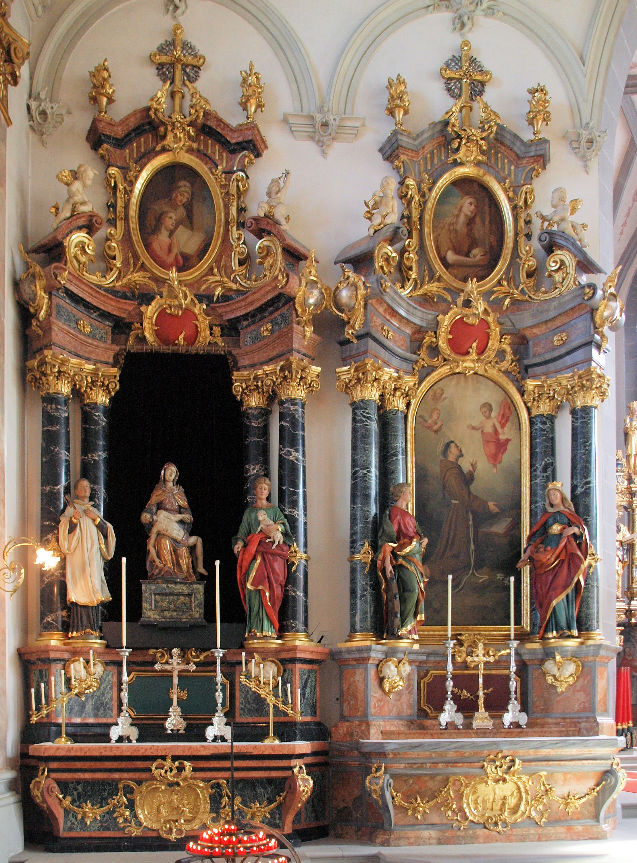 Die beiden nörlichen Seitenaltärei in der Pfarrkirche St. Mauritius in Appenzell. Sie wurden von der Firma Greppi zwischen 1890 und 1892 hergestellt. Entwofen wurden sie vom Bildhauer Eduard Müller.